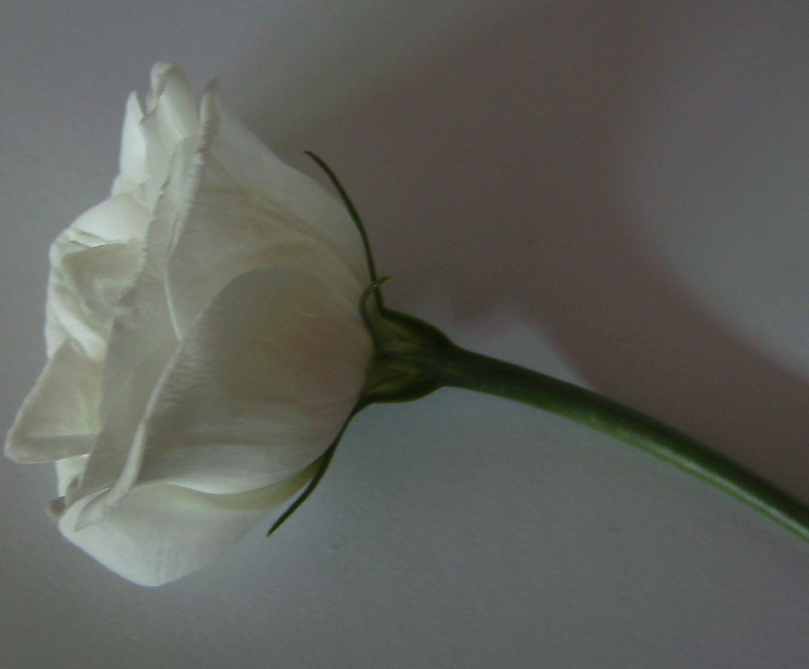 Eustoma russellianum flor de perfil